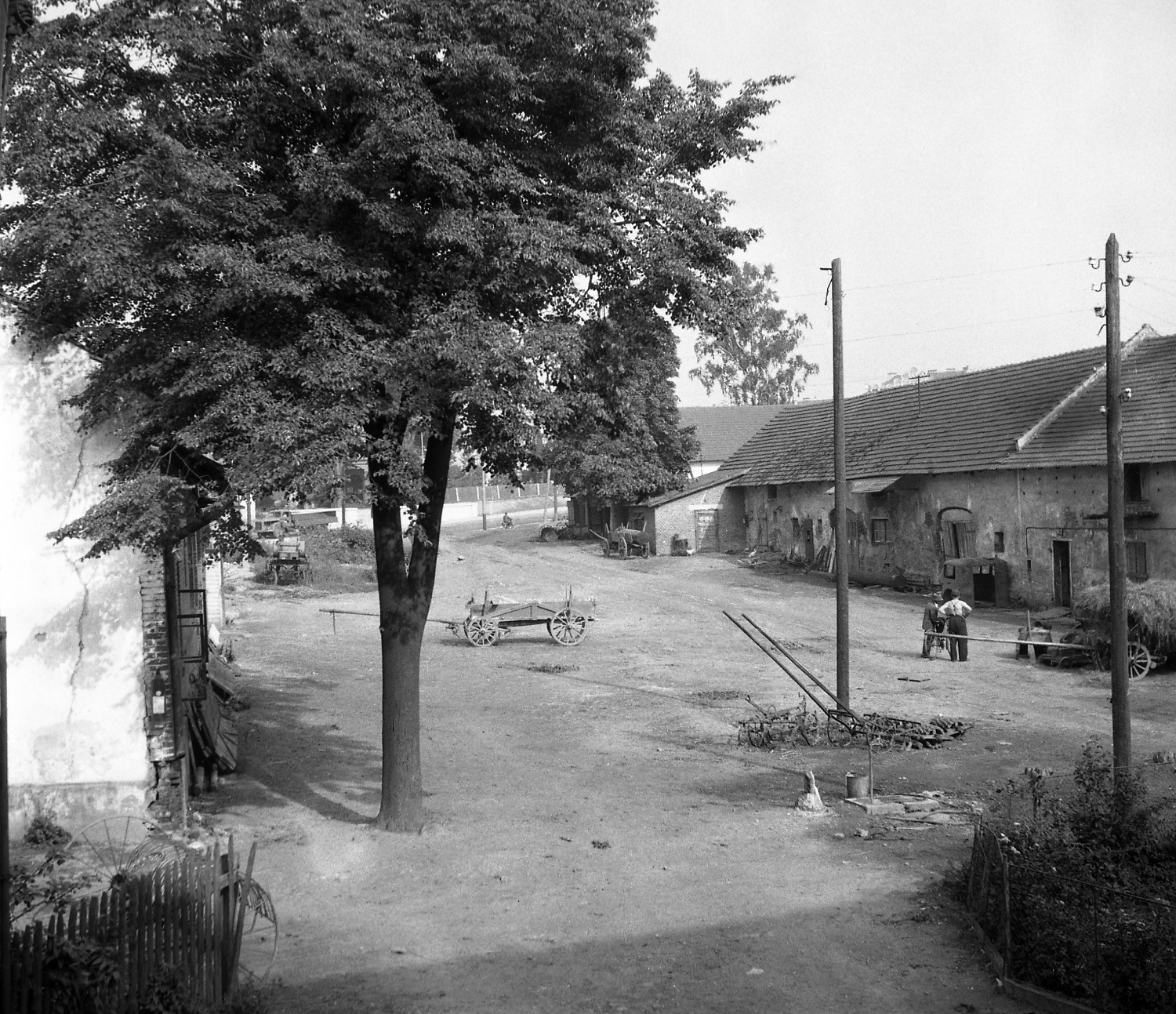 Dvůr státního statku Havířov v době rodícího se města.